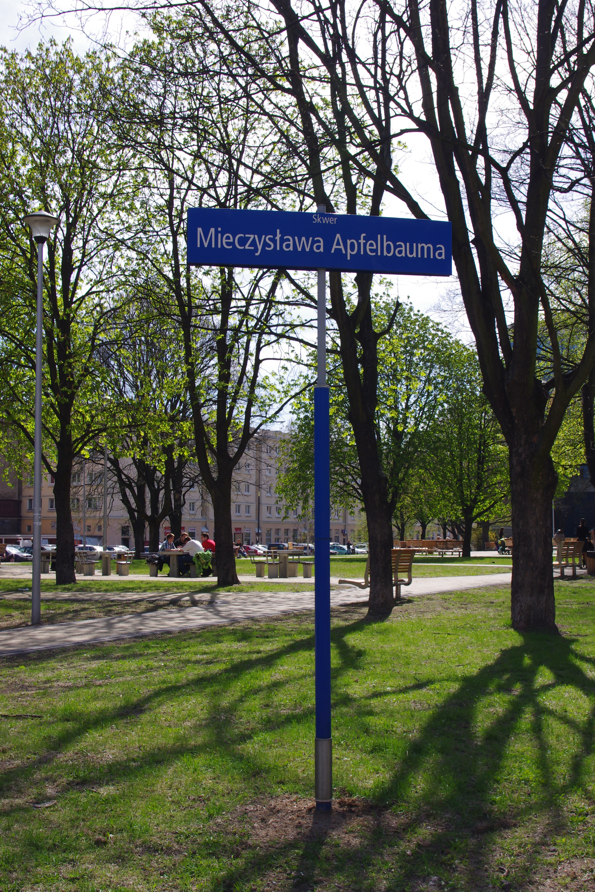 Skwer im. Mieczysława Apfelbauma (wł. Dawida Moryca Apfelbauma) – jednego z organizatorów i przywódców Żydowskiego Związku Wojskowego w getcie warszawskim na terenie warszawskiej Woli (osiedle Nowolipki)